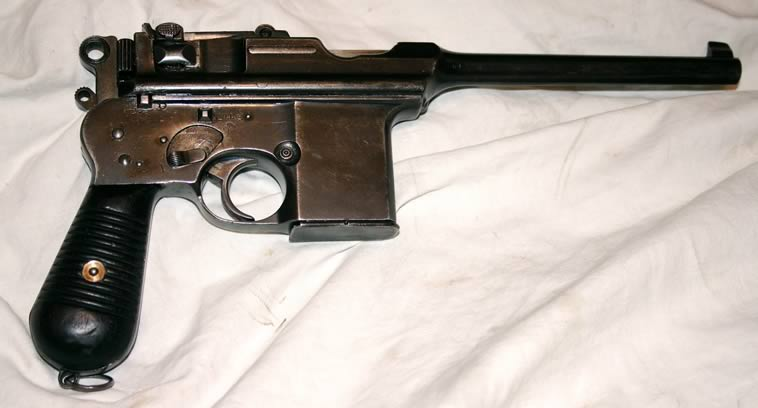 Pistolet samopowtarzalny Astra 903 należący niegdyś do Zbigniewa Cerkowniaka, ps. Boruta.